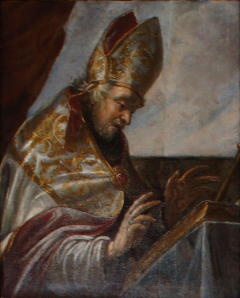 Porträtgemälde von Gottschalk von Hagenau, Bischof von Freising, im Fürstengang zwischen Fürstbischöflicher Residenz und Freisinger Dom.